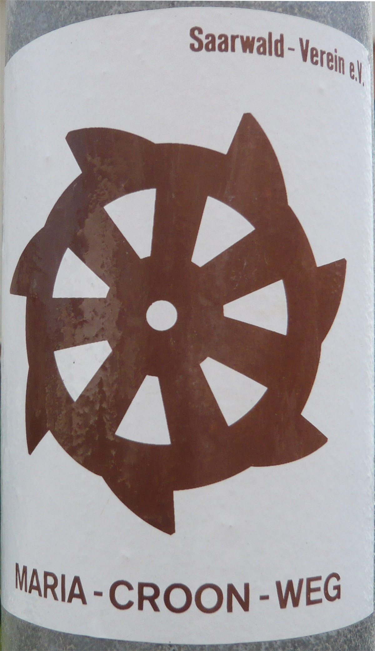 Maria-Croon-Weg - Markierungsschild (Aufkleber) auf einem Laternenmast in Trassem